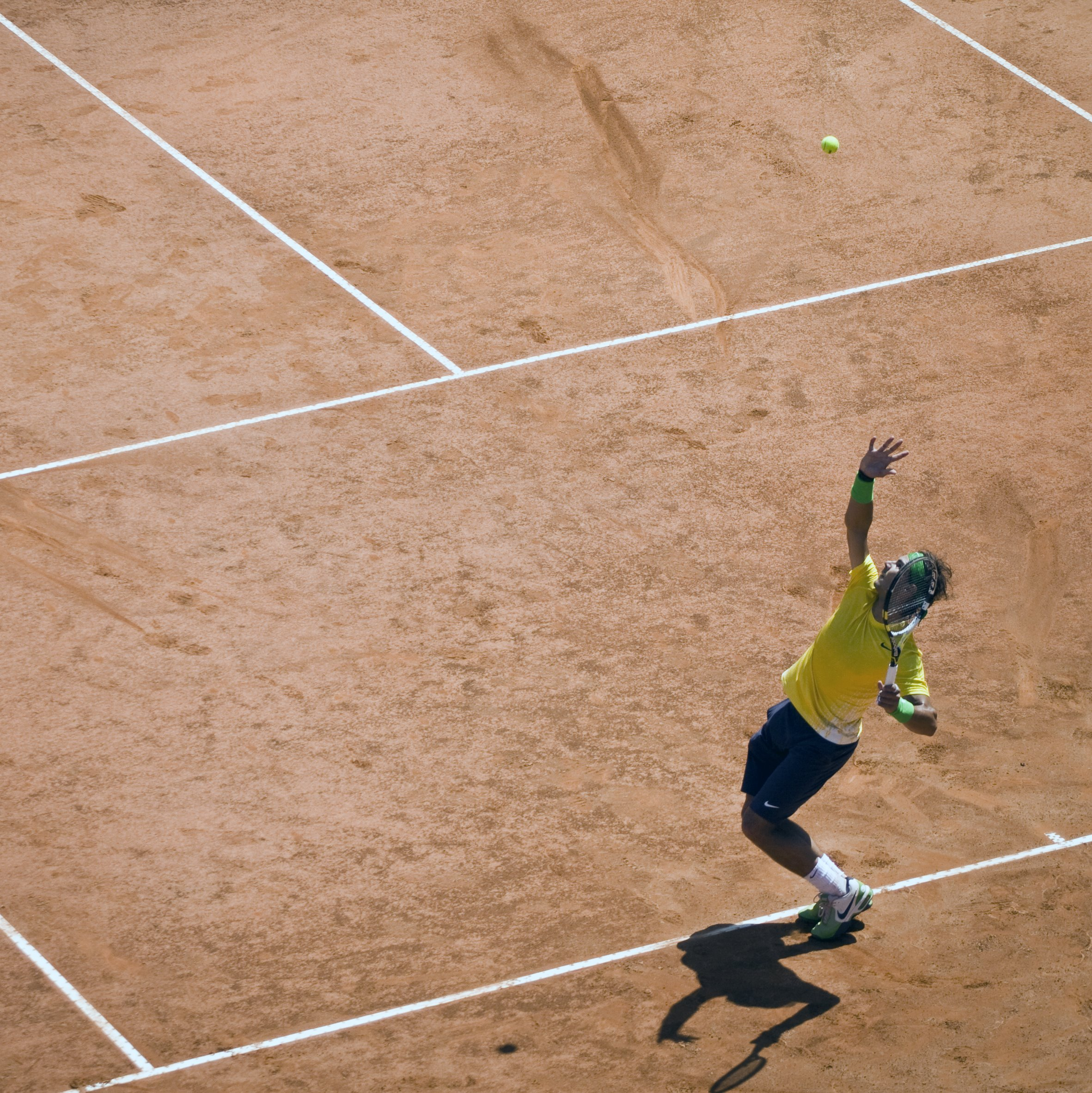 Rafael Nadal in Rome 2011